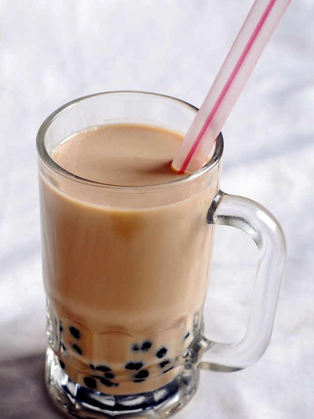 Clásico Bubble Tea con Tapioca, hecho por OQ Miltea Shop, Madrid